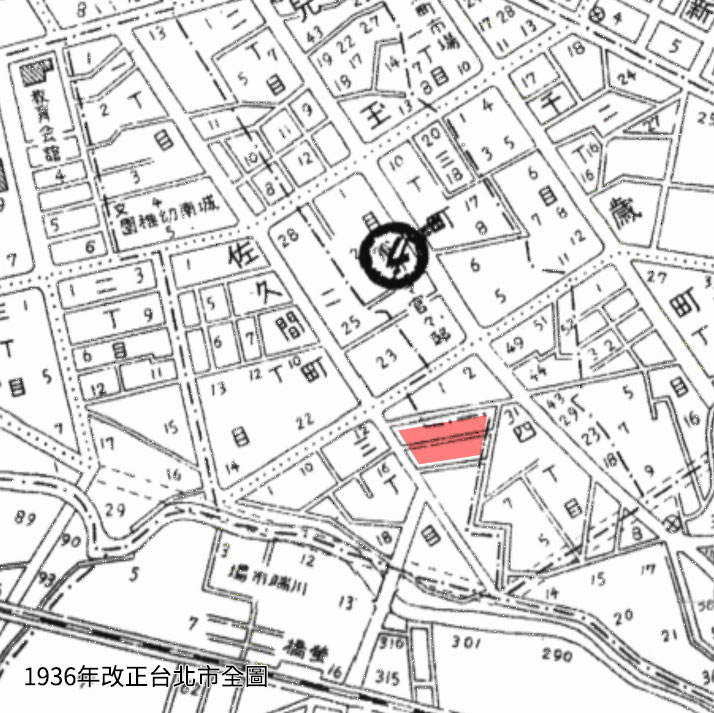 中文（台灣）: 台北兒玉町附近 底圖1936年改正台北全圖自中央研究院人社中心GIS專題中心 (2016). [online] 臺灣百年歷史地圖. Available at: [2017-02-27].